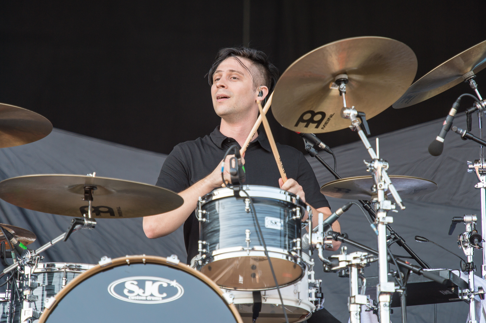 ARGO-Konzerte,Centerstage,Falling in Reverse,Konzert,Livekonzert,Livemusik,Musik,RiP,Rock im Park 2014,Ryan Seaman